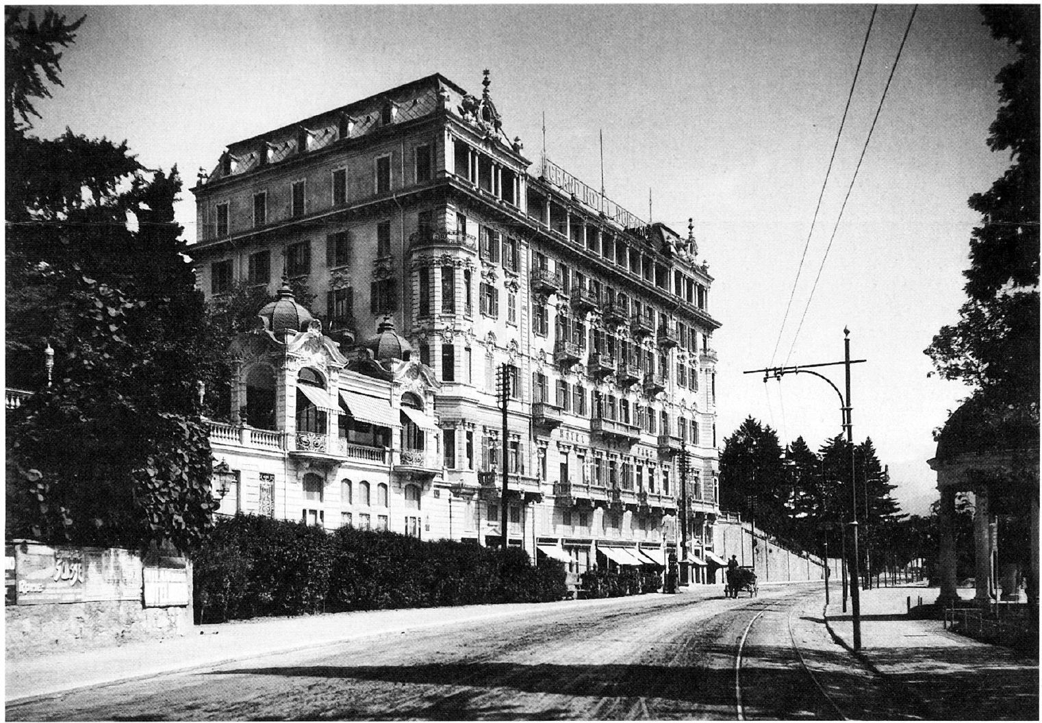 Hotel Du Parc et Beau-Sejour, Lugano, Umbau und Erweiterung 1904-05 durch Architekt Paolito Somazzi, Foto Wehrli, Zürich